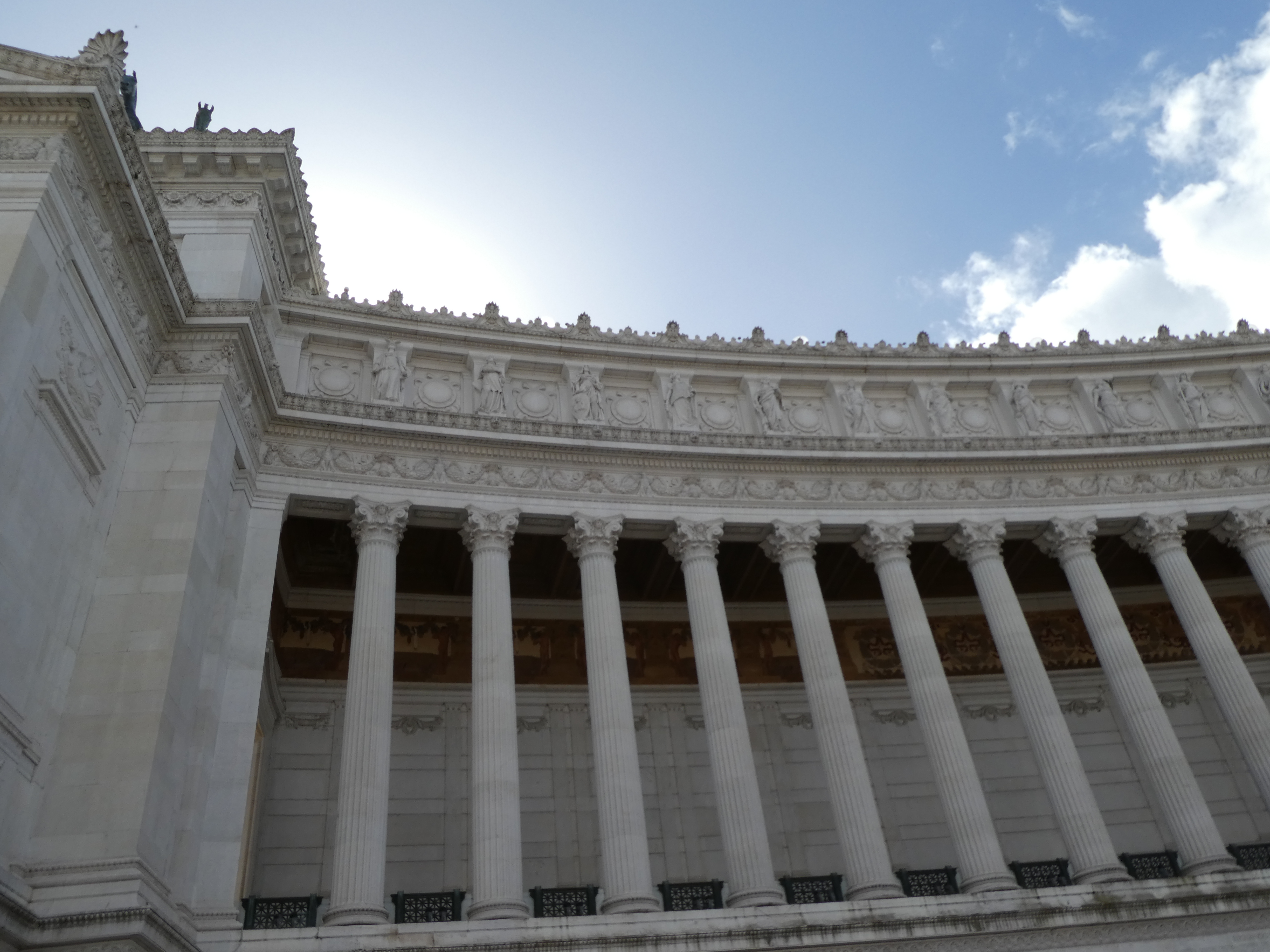 vedi titolo